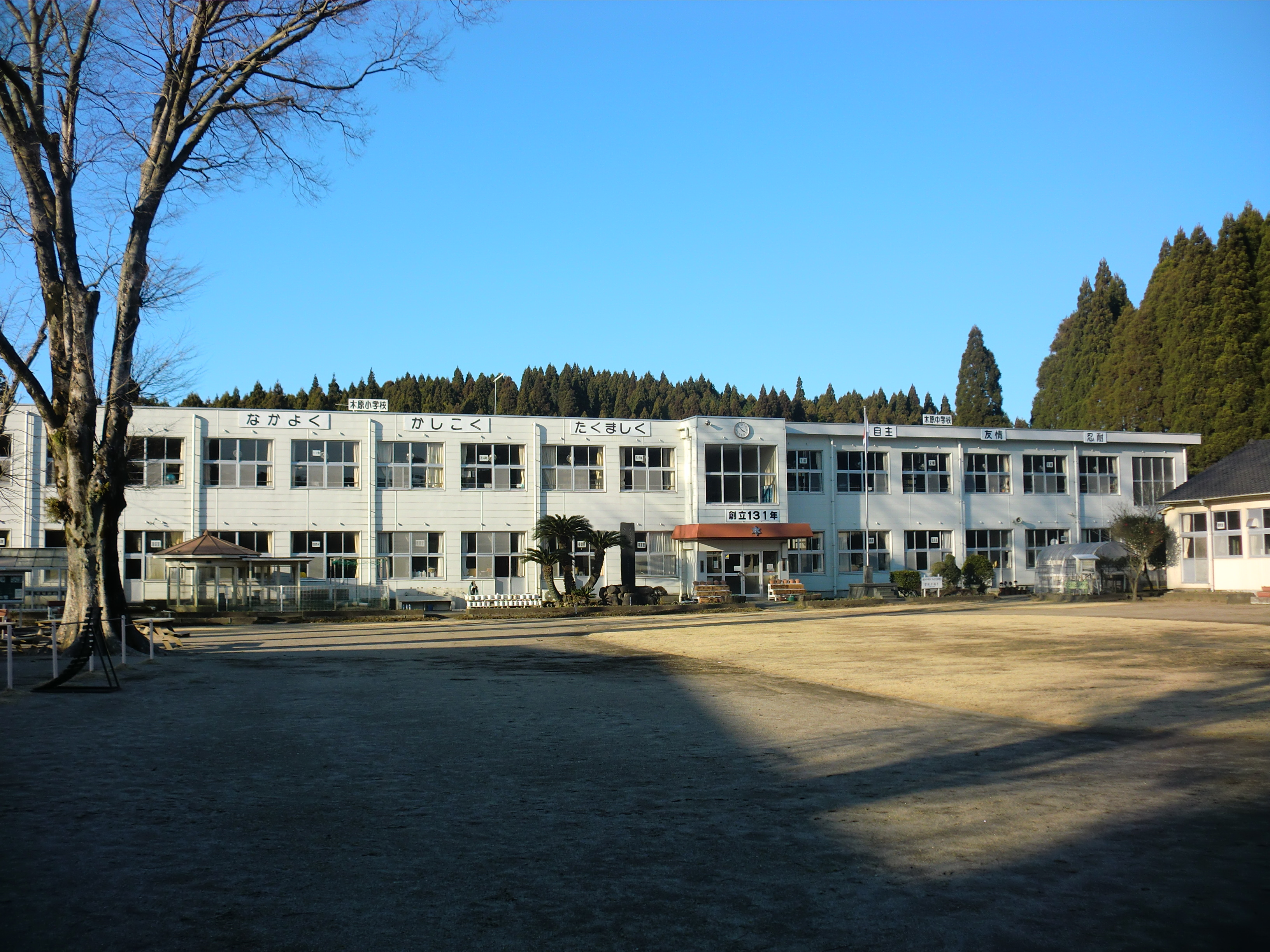 霧島市にある霧島市立木原（きはら）小中学校